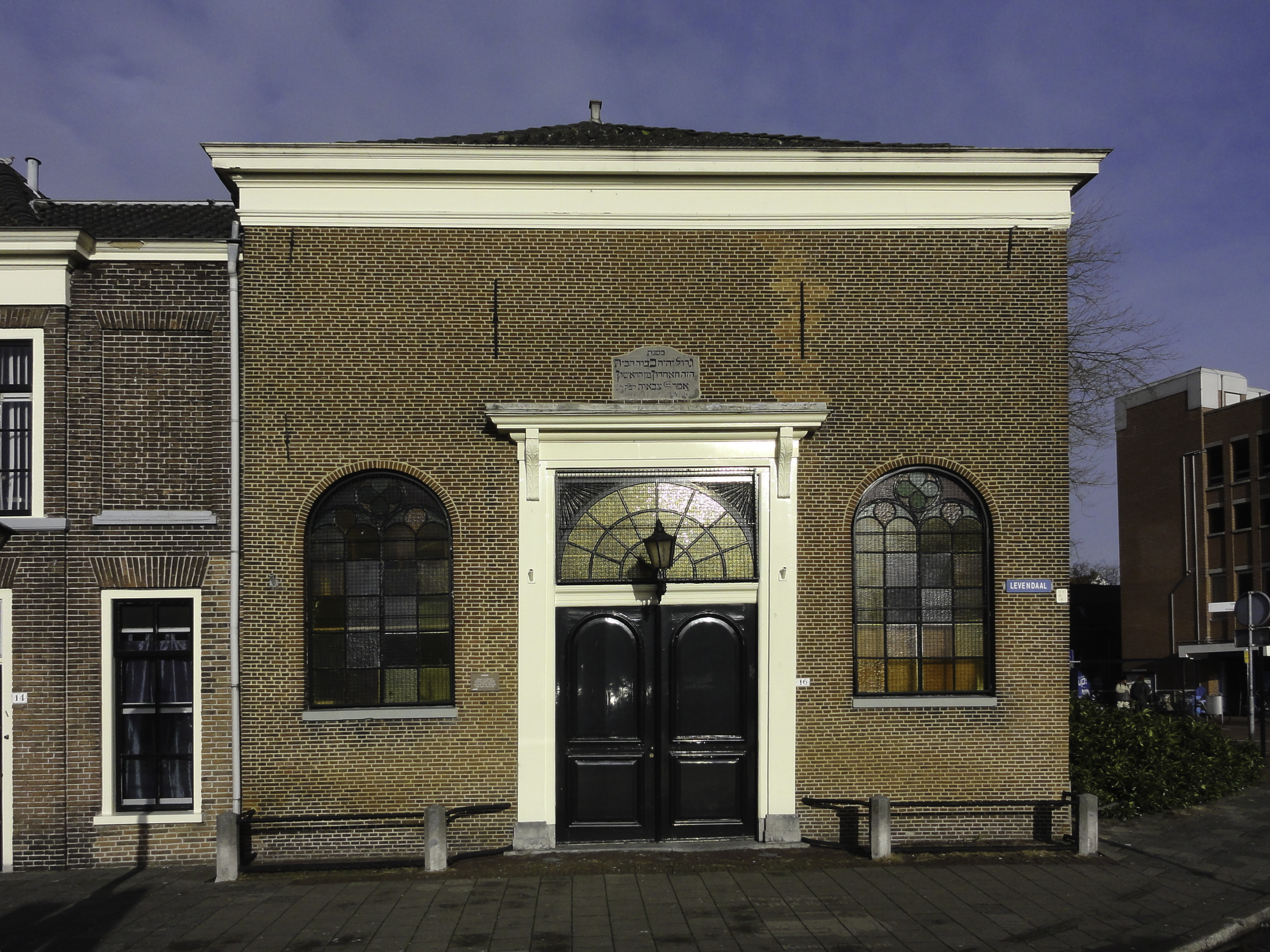 Synagoge Levendaal 16 Leiden (1723)